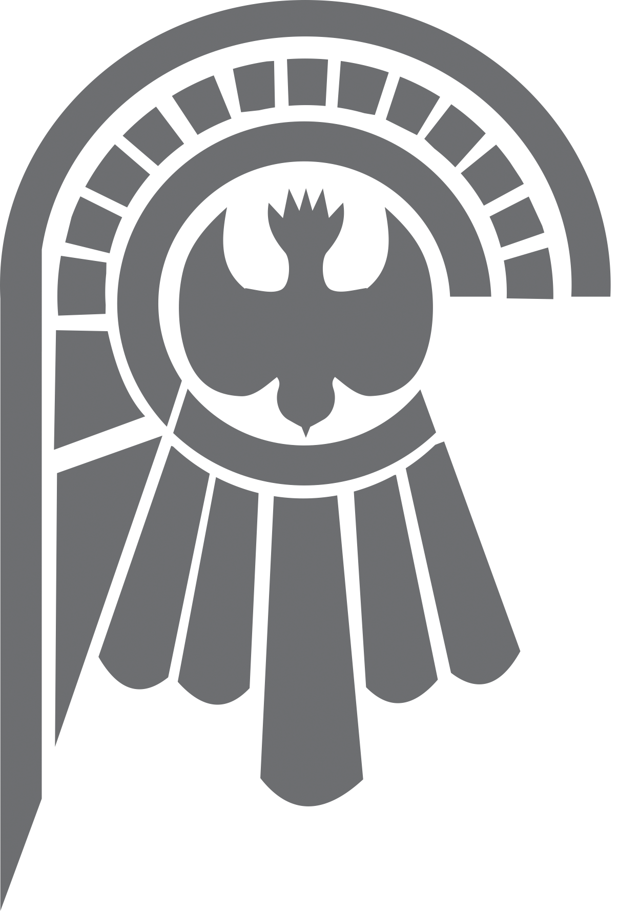 Escudo Municipal de Pueblo Viejo